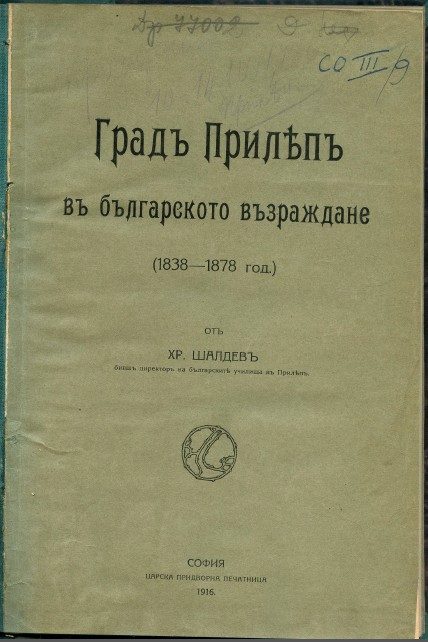 Прилеп и Българското възраждане